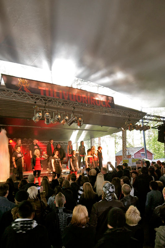 Timon Kuoro Tulivuorirockissa 2009